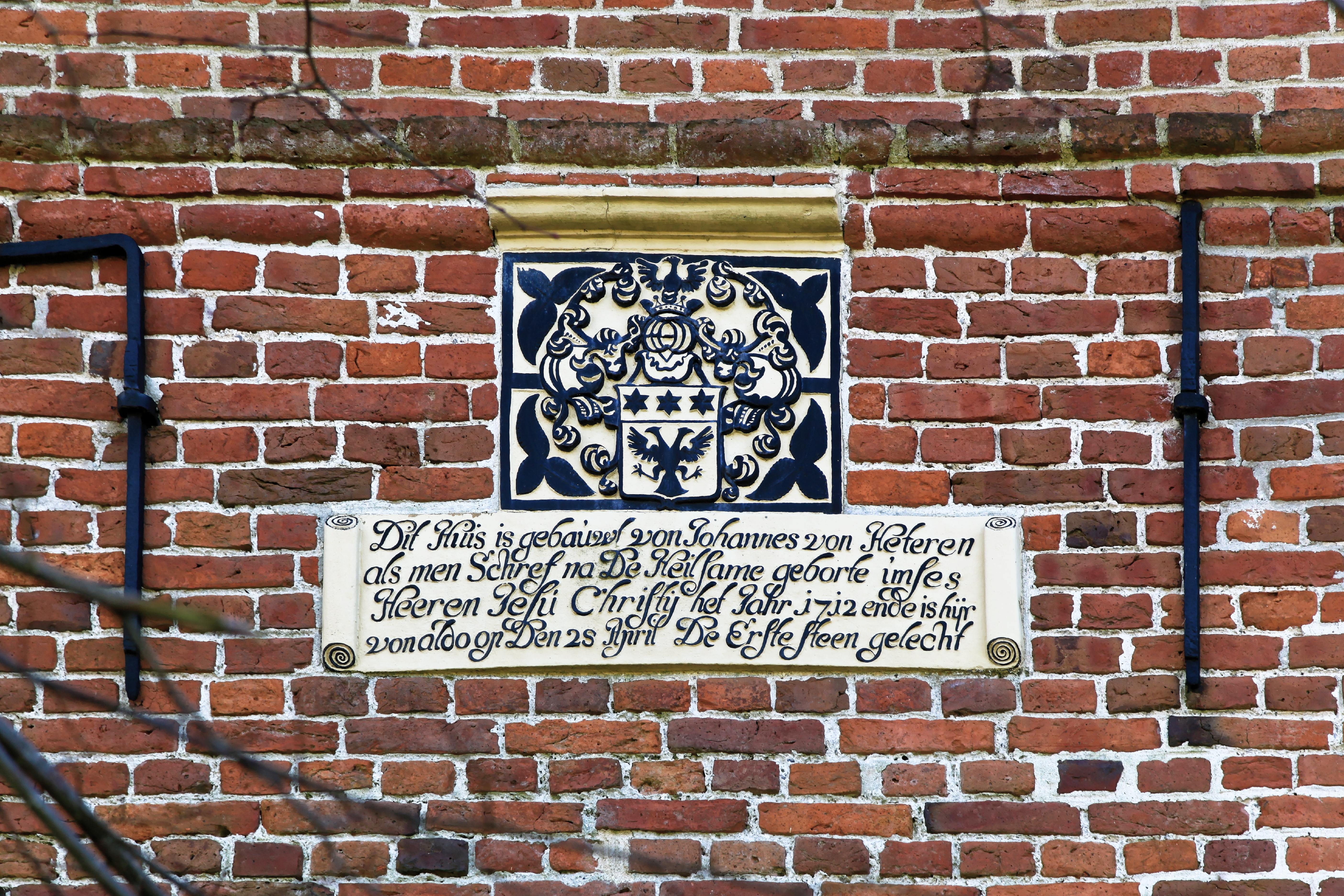 Steinhaus Bunderhee, Steinhausstraße 64 in Bunde (Germany)